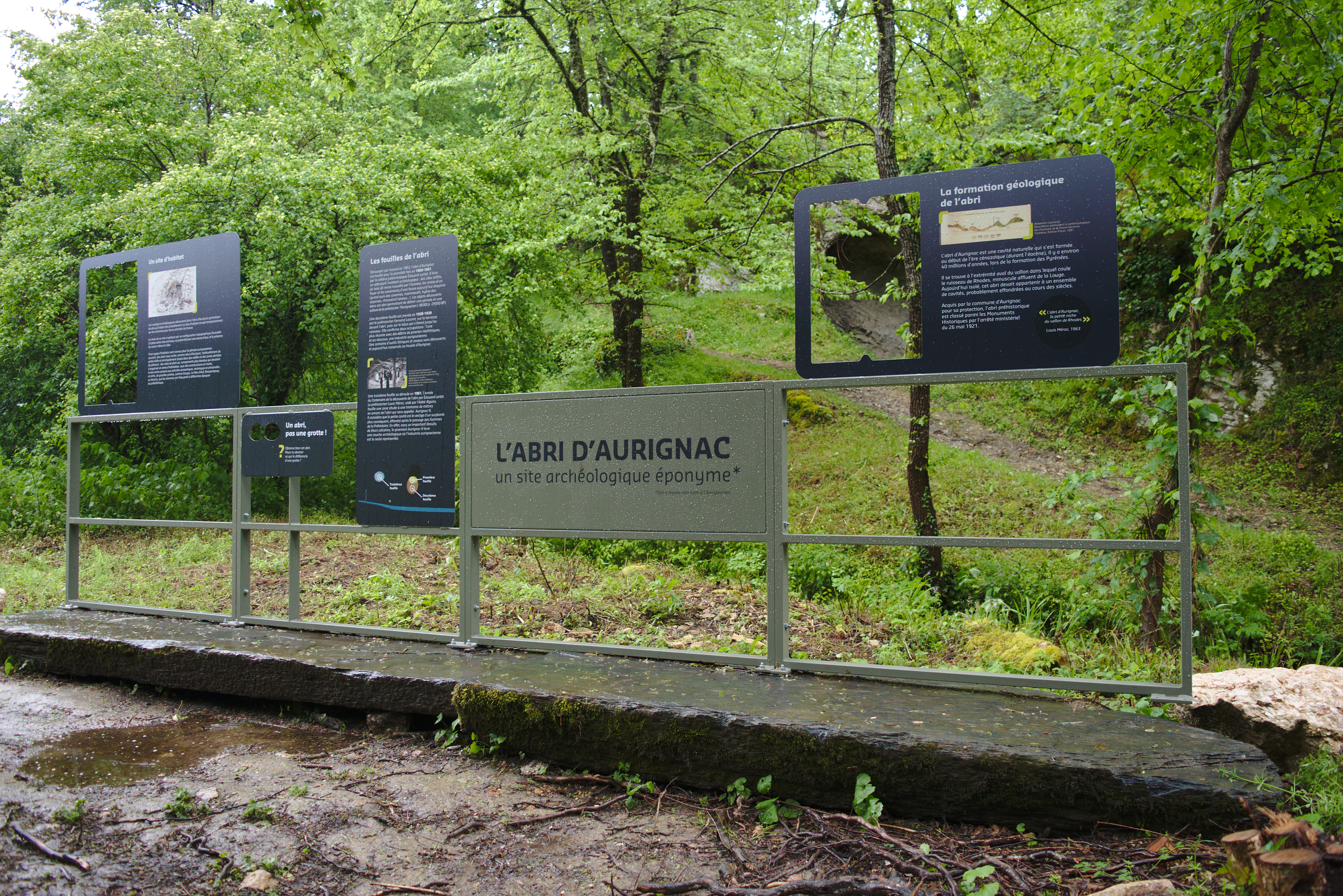 Abri préhistorique (grotte d'Aurignac) .